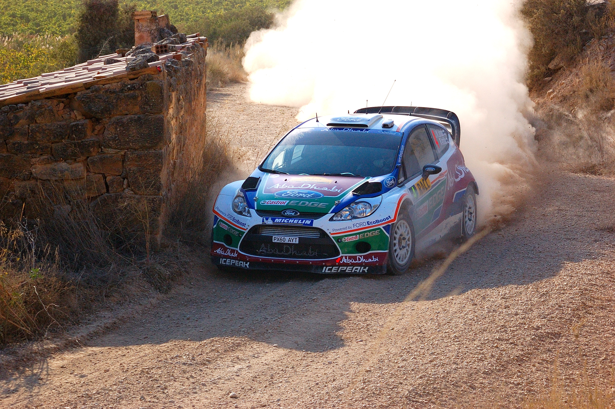 Latvala/Anttila